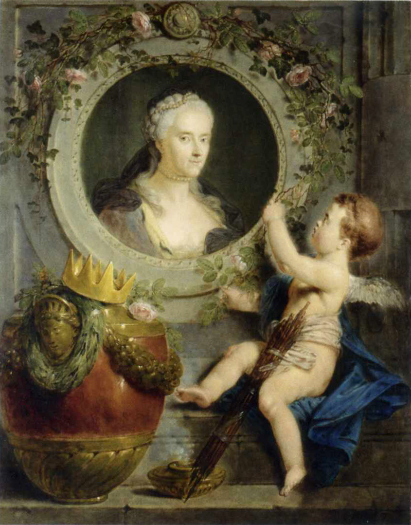 Portrait der Luise von Braunschweig-Wolfenbüttel (1722-1780)